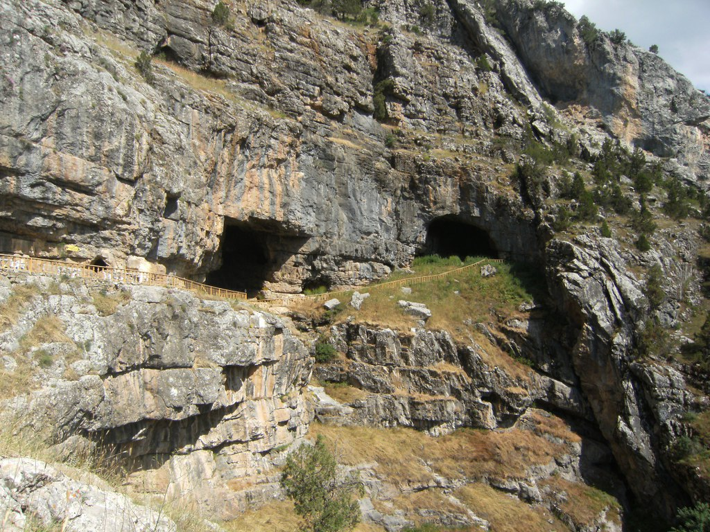 Tınaztepe Mağarası